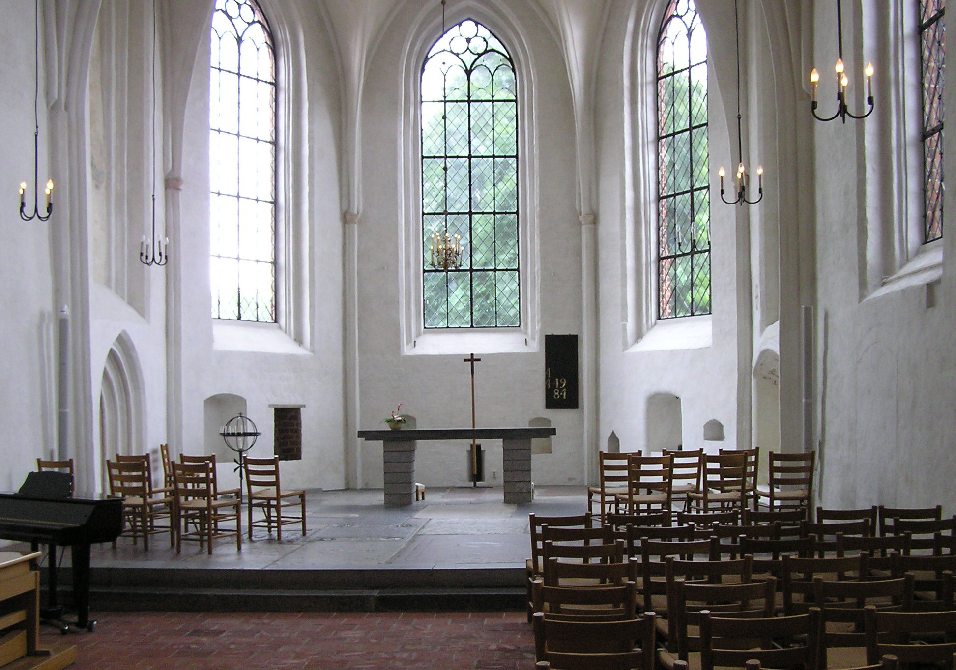 Sankt Petri kirke,Ystad